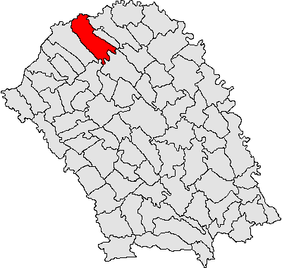 Categorie:Hărţi ale judeţului Botoşani